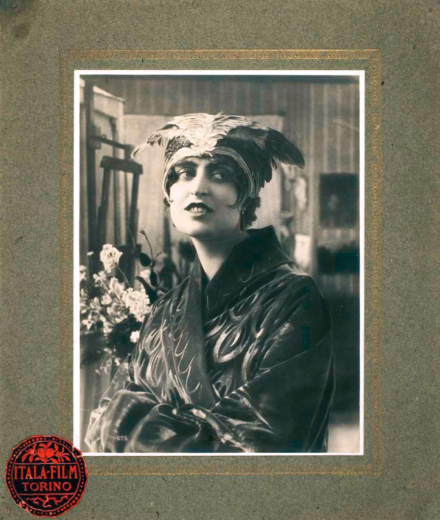 Lobby card of Pina Menichelli ne "Il fuoco" (1915)